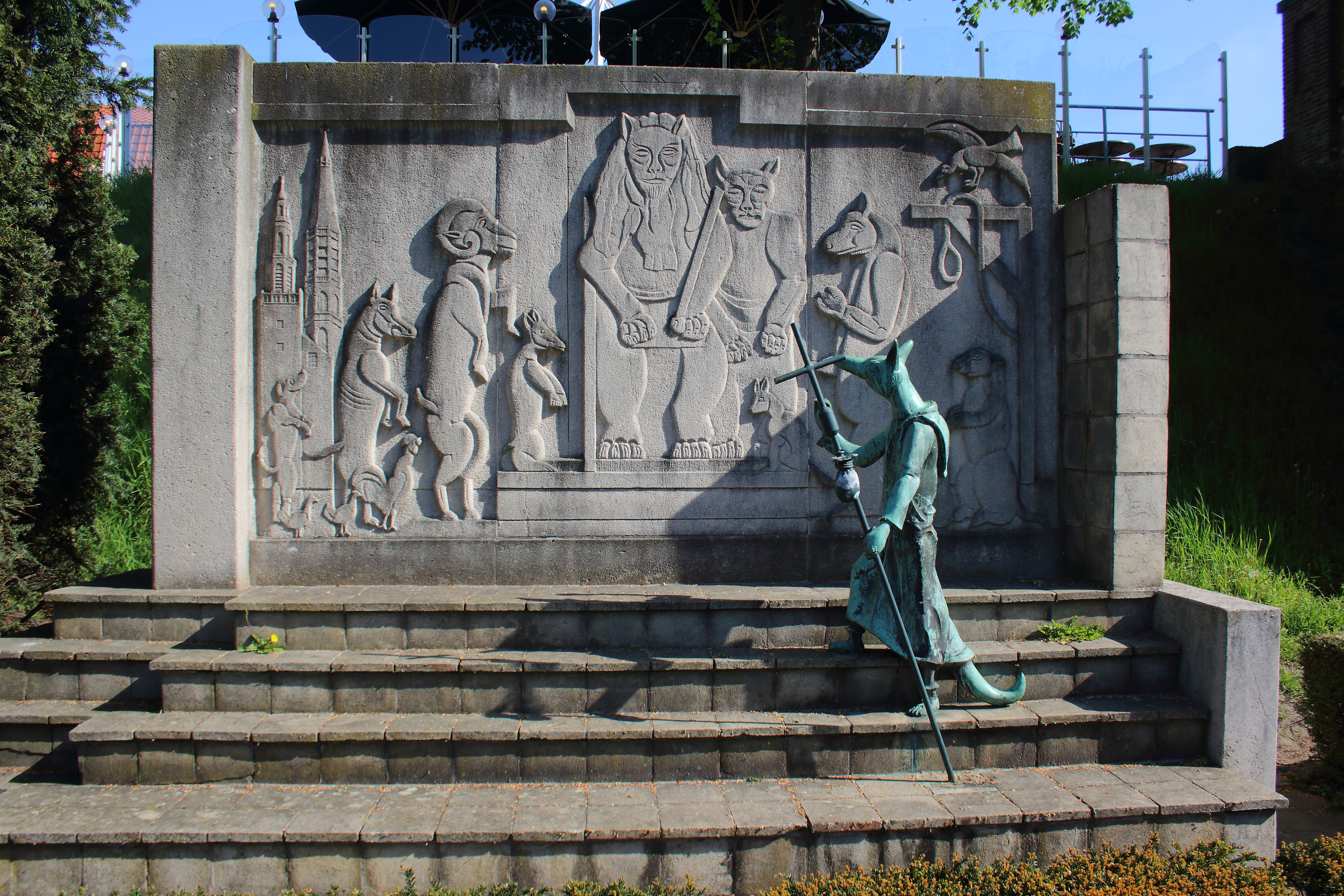 Reynaertmonument, Hulst, Zeeuws-Vlaanderen, Zeeland, Nederland